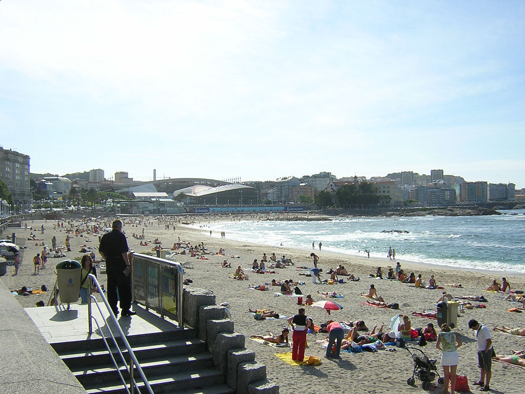 Praia de Riazor, A Coruña, Galiza'Beach of Riazor'